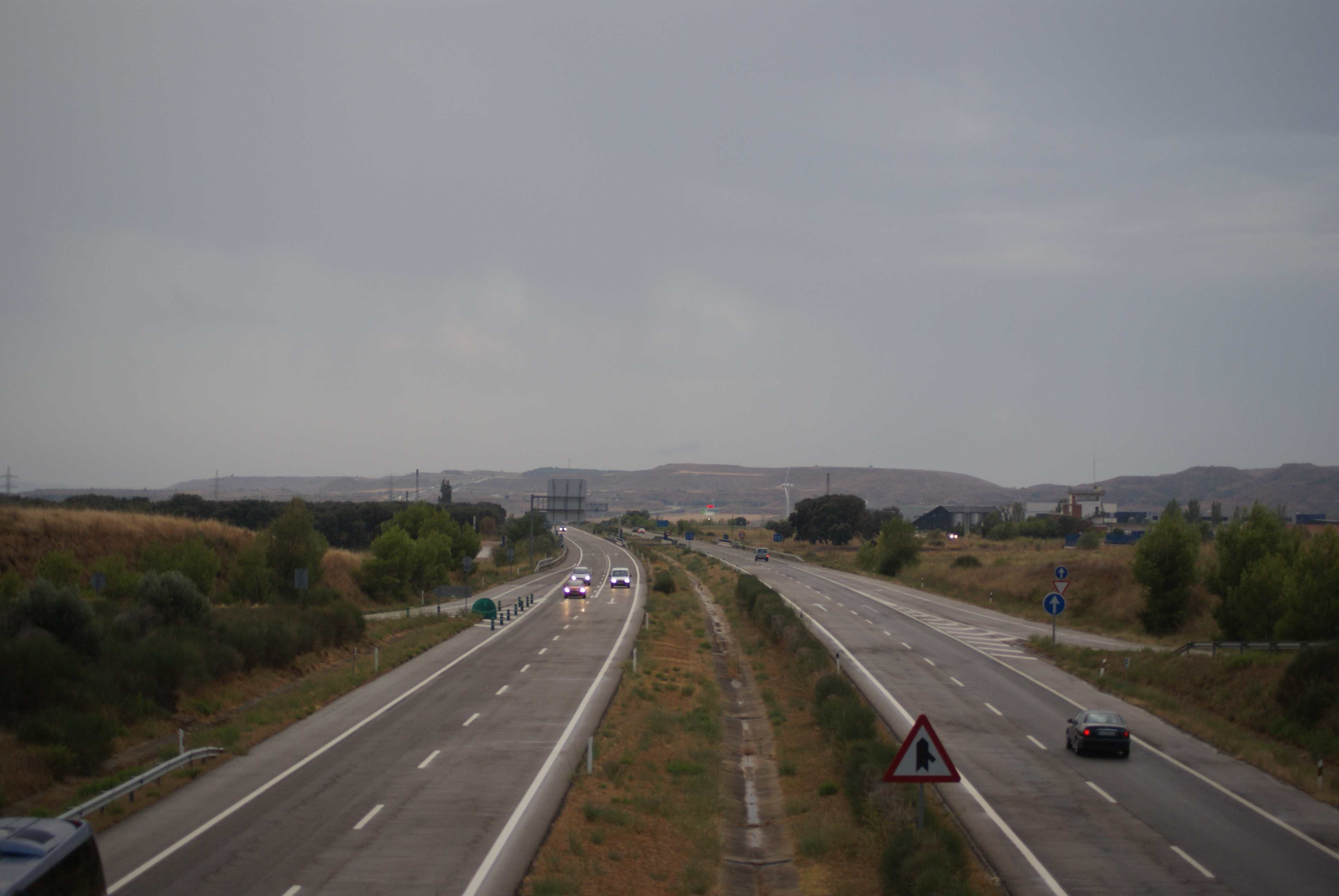 Salida de Huesca a Zaragoza. Nuevas zonas industriales. A la derecha el Parque Tecnológico Walqa y a la izquierda la Plataforma Logística PLHUS